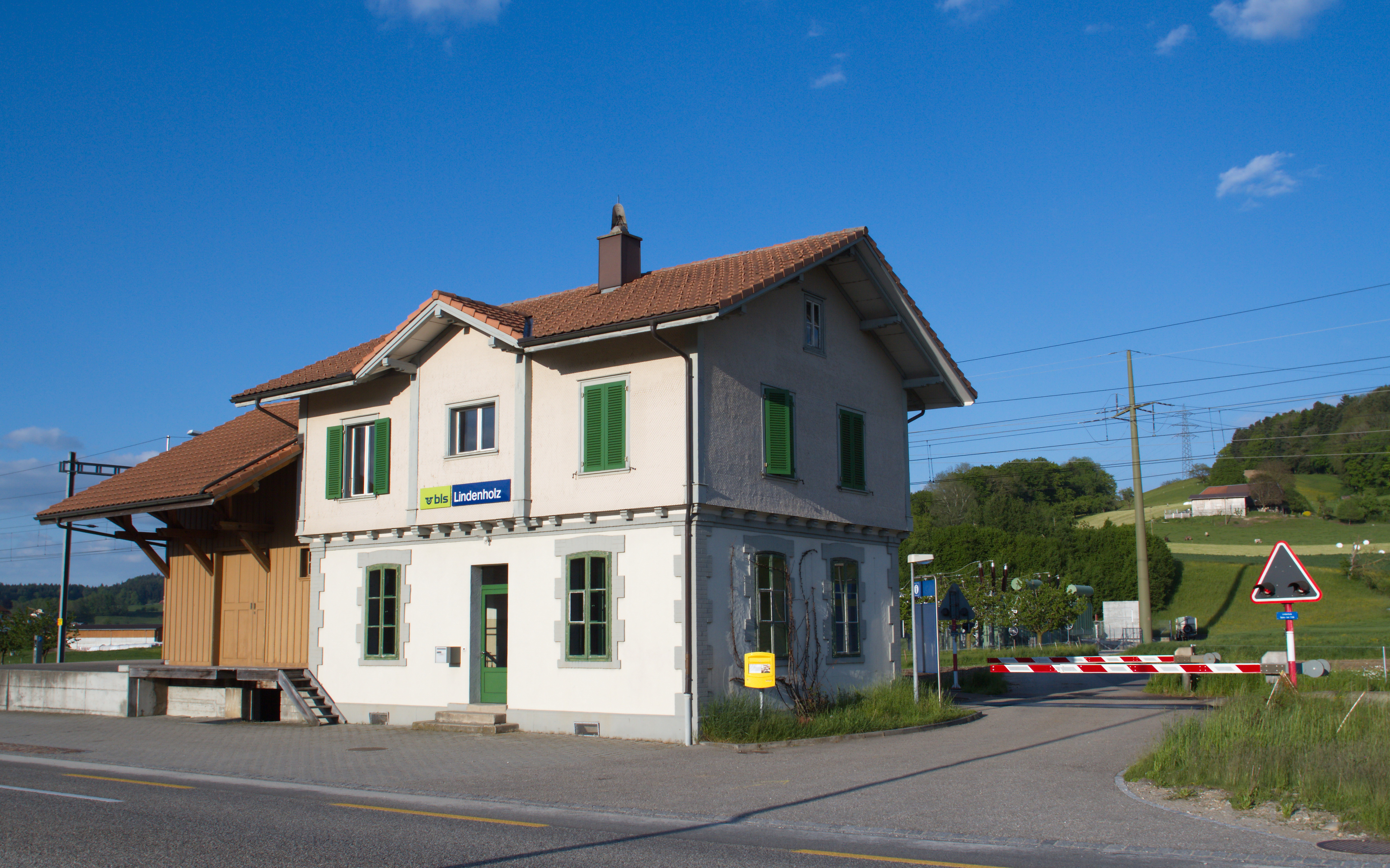 Bahnhof Lindenholz b.Madiswil BE, Oberaargau, Schweiz